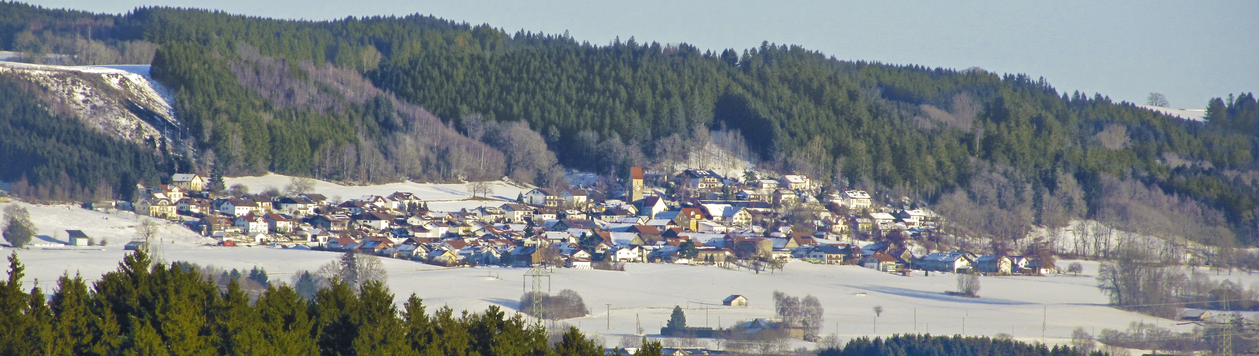 Panorama Bild von Westen auf Schrattenbach (Dietmannsried) Jan. 2017